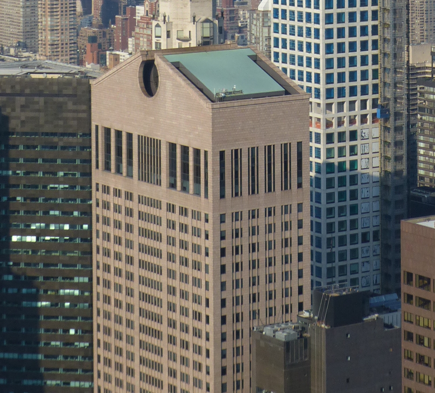 Gratte-ciel le 432 Park Avenue à Manhattan; photo prise de la tour de Rockefeller.